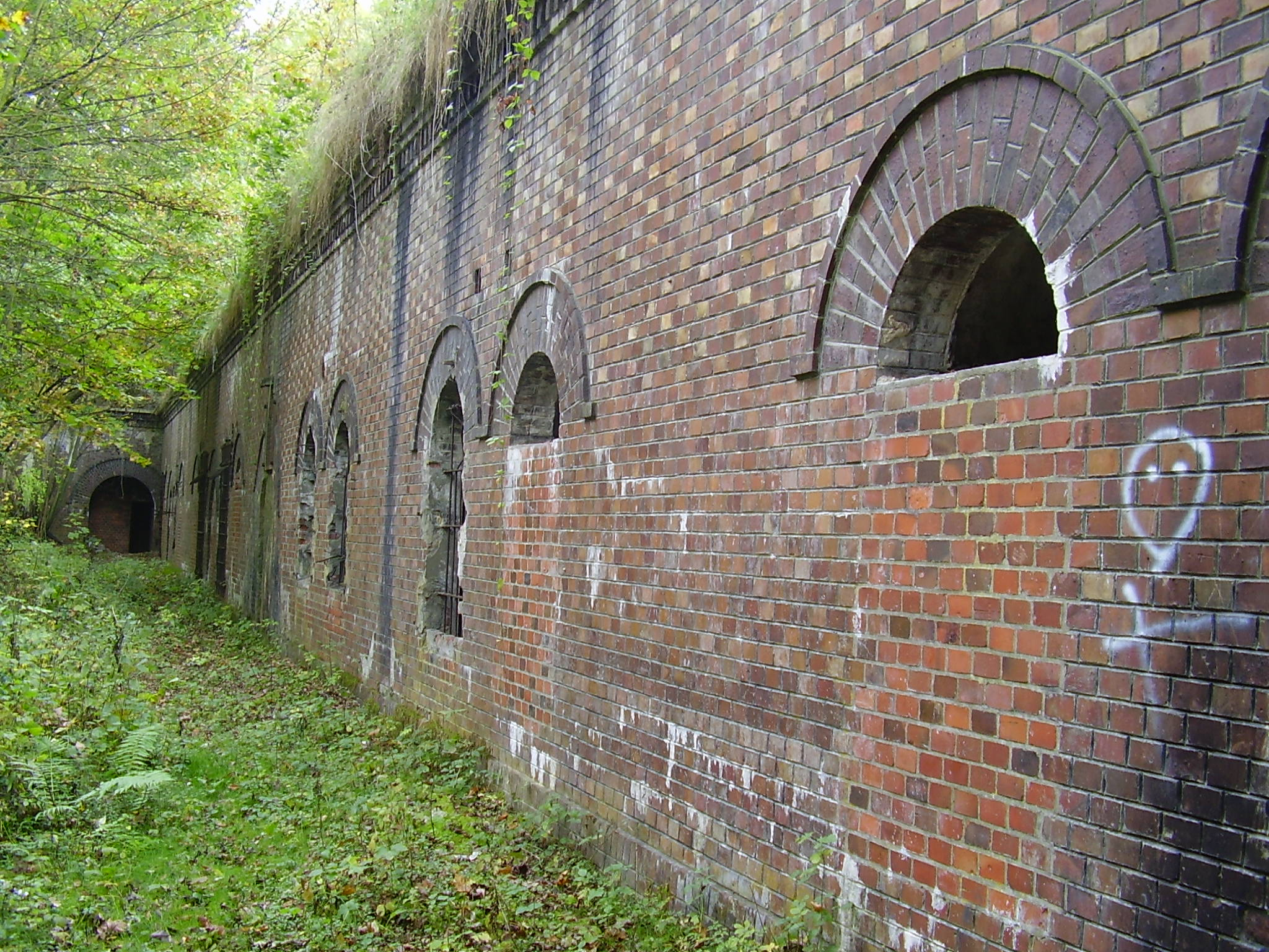 Fort 1a - Poznań